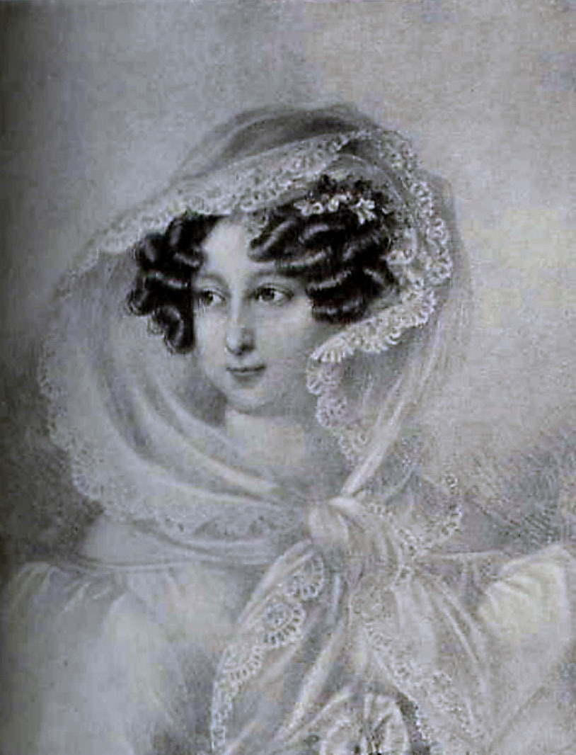 Portrait of Wilhelmine von Sagan (1781-1839)